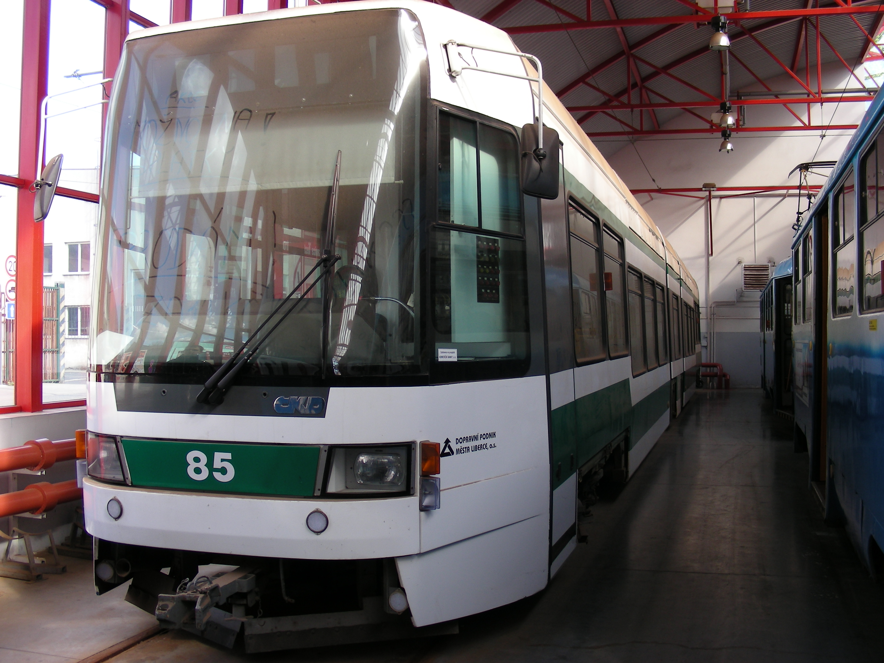 Tramvaj RT6S